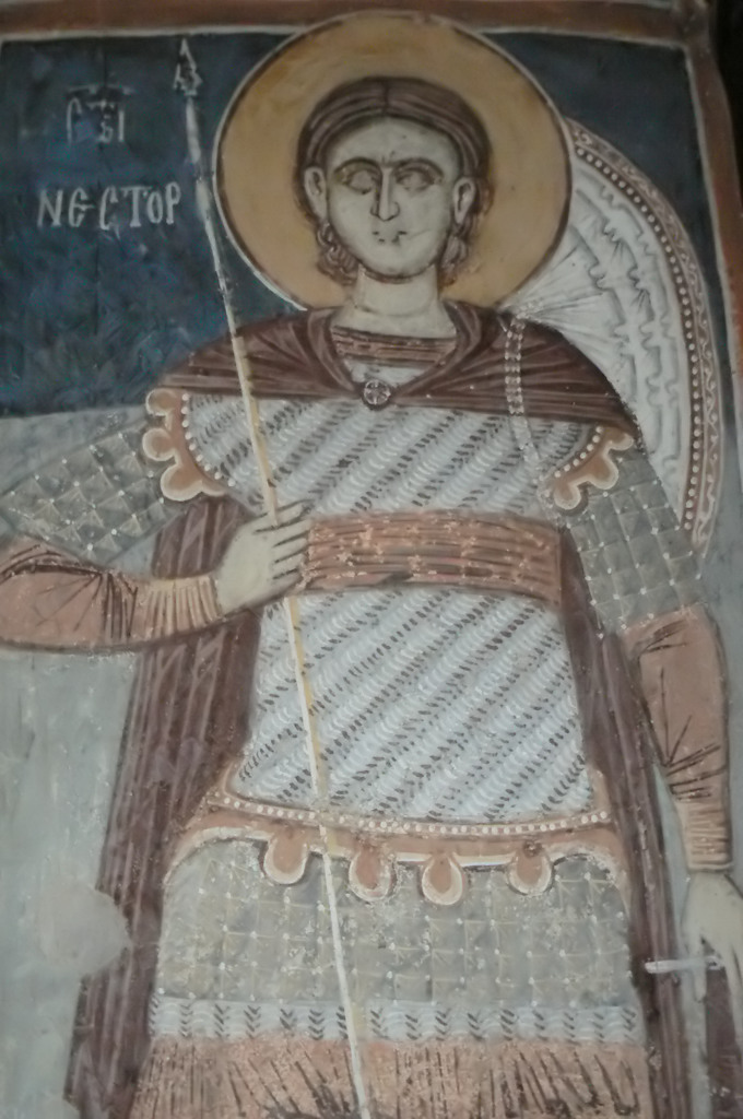 Стенопис на Свети Нестор в черквата на Земенския манастир. Fresco of St. Nestor in the Zemen monastery, Bulgaria